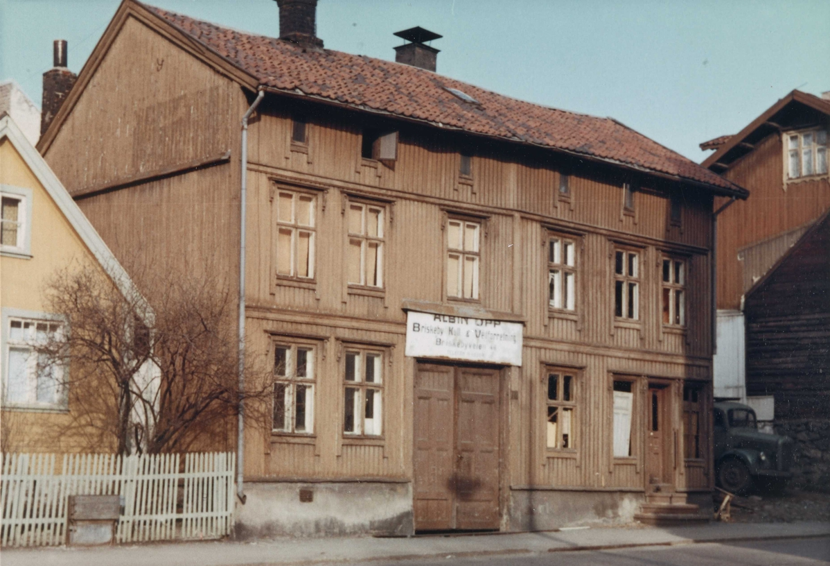 Briskeby kull- og vedforretning (Albin Upp) i Briskebyveien 46. Foto: Thorbjørn Gustavsen, 1969. Fra Byhistorisk samling hos Oslo Museum.